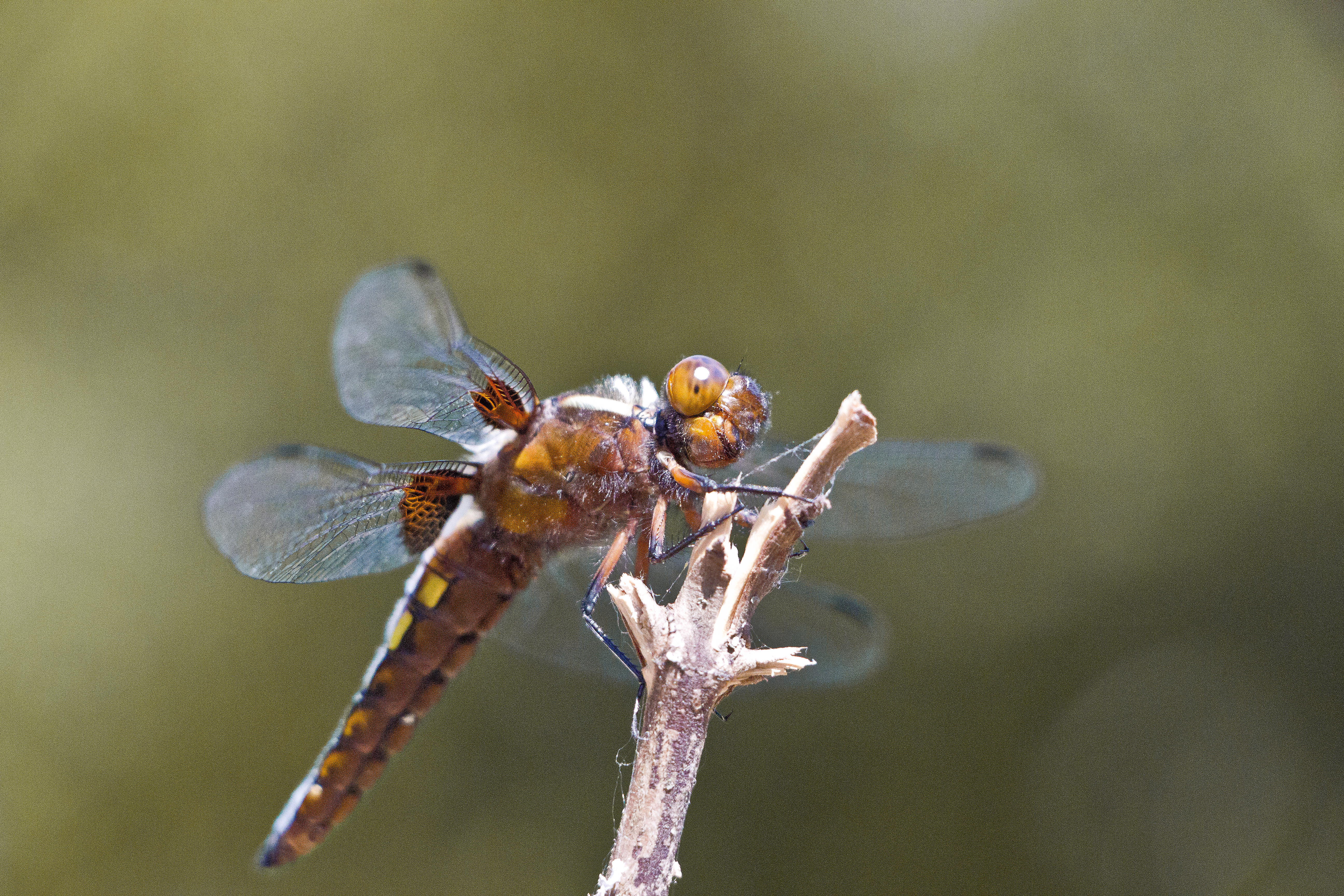 Großaufnahme einer Libelle. Fokus liegt hier auf den Kopf des Insekts.